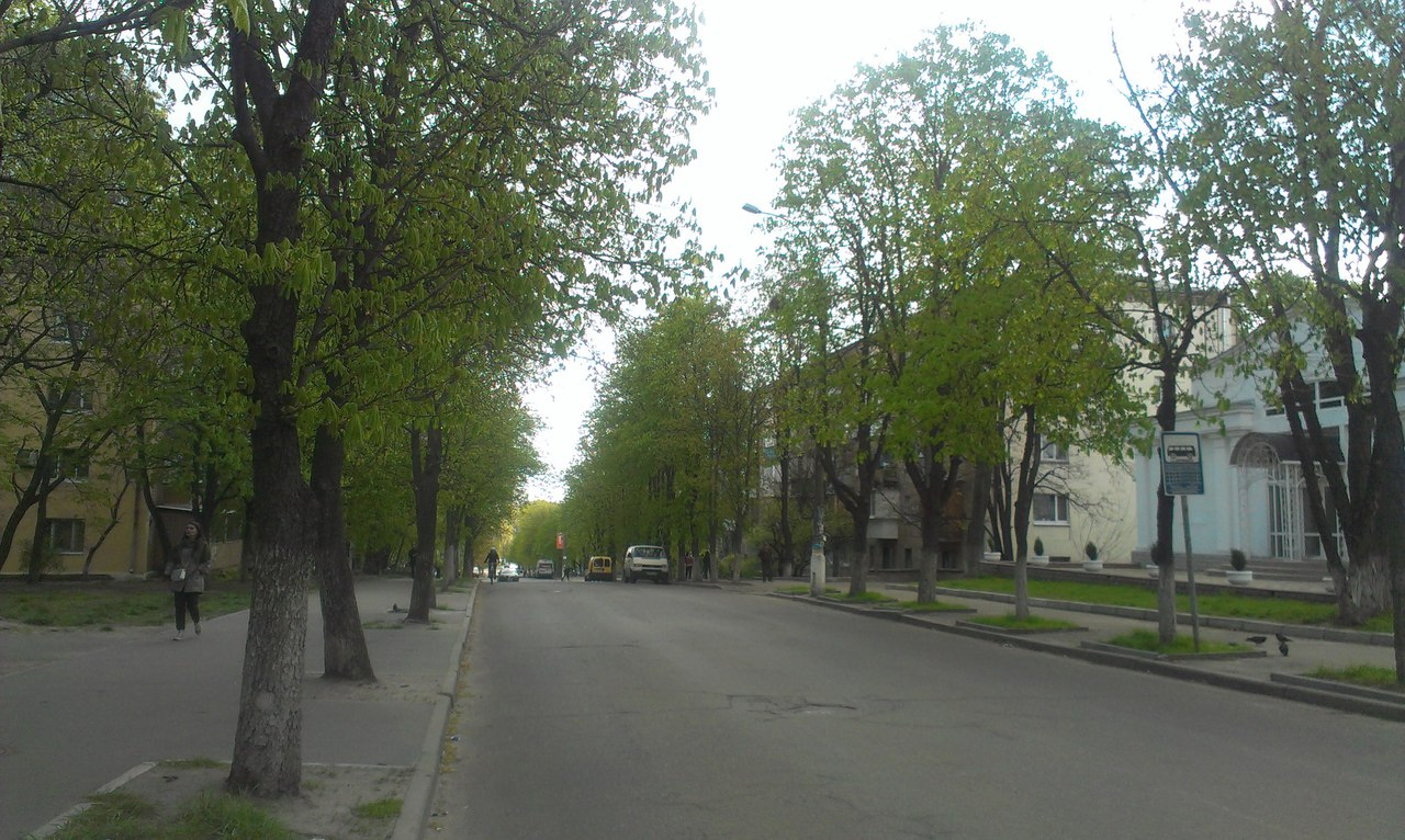 Краснопольская улица в Киеве